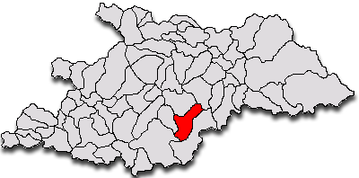 Categorie:Hărţi ale judeţului Maramureş